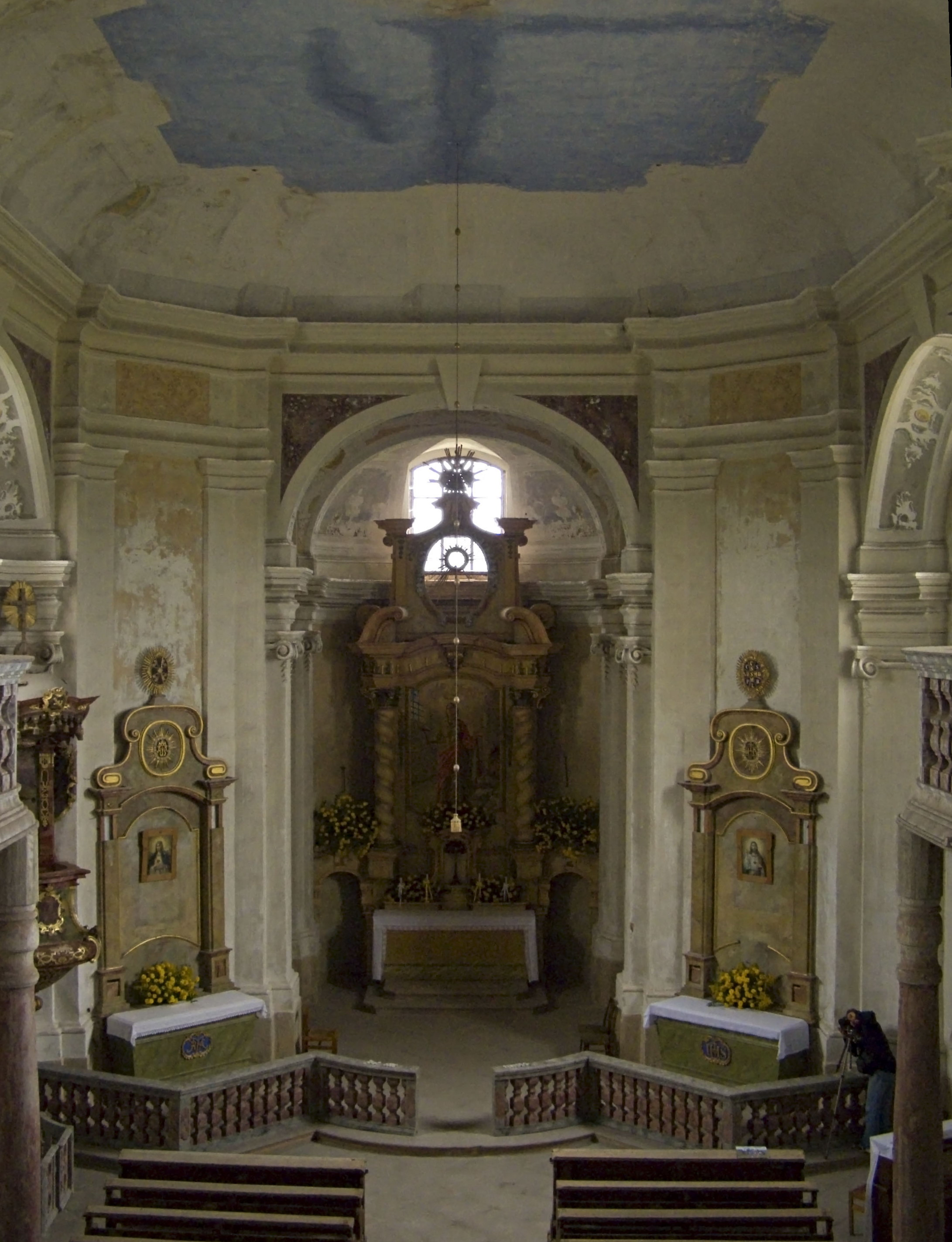 Šonov, Kostel svaté Markéty